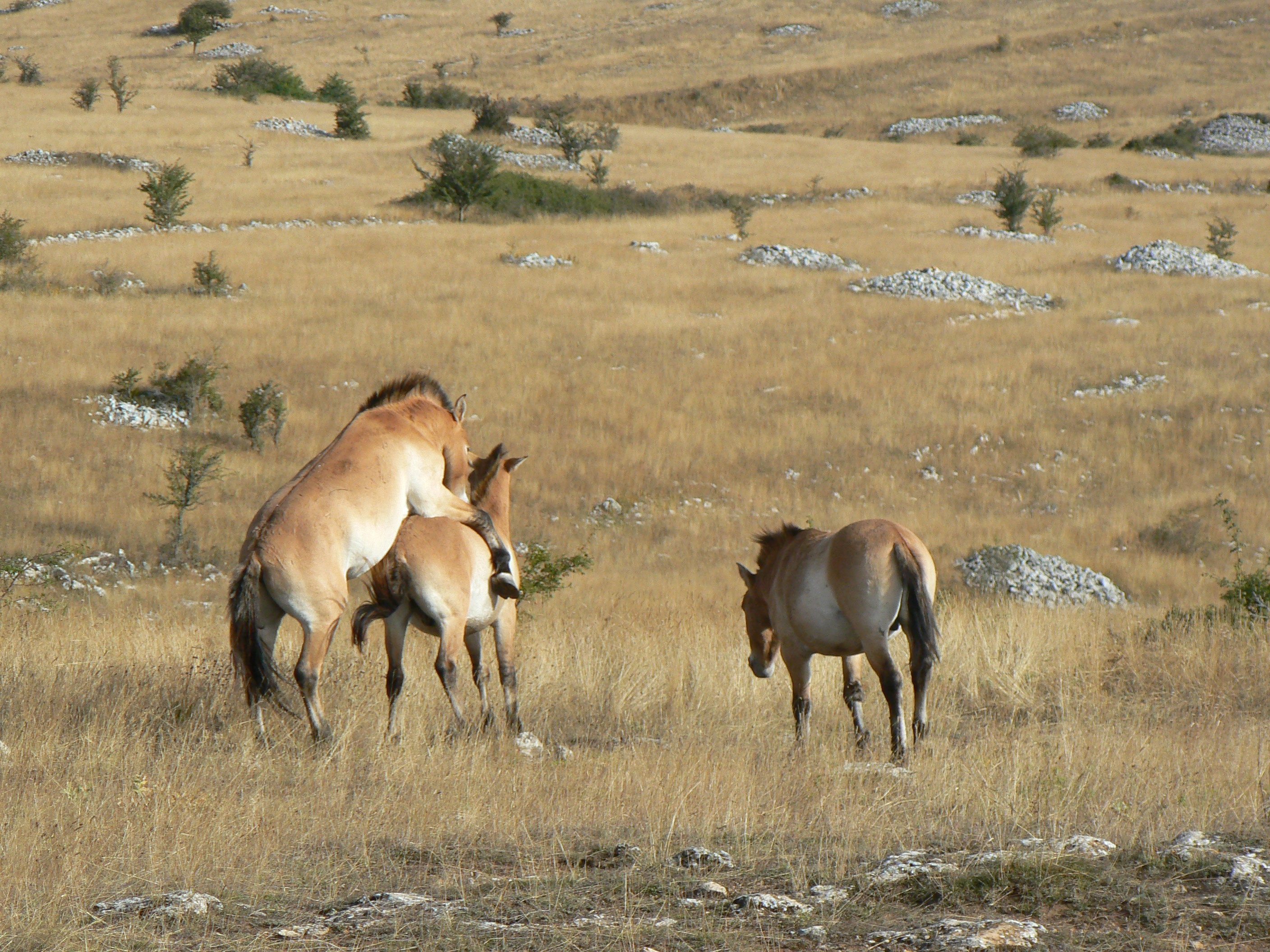 Chevaux de Przewalski sur le causse Méjean en Lozère